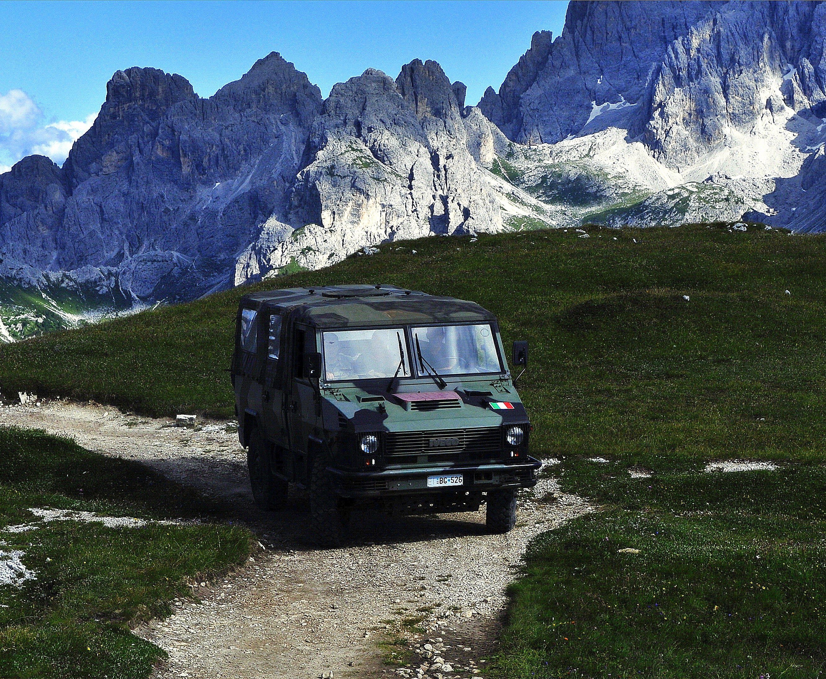 Veicolo Iveco VM dell'esercito italiano su Monte Piana.